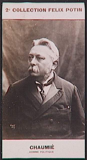 Chaumié Joseph (1849-1919), homme politique français